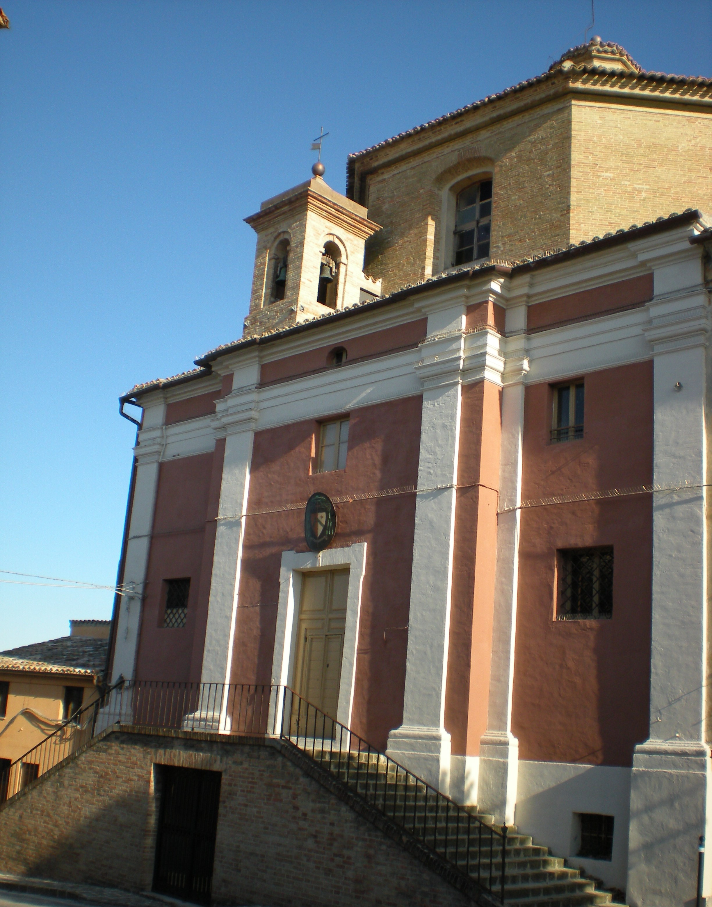 Chiesa di Santa Maria delle Grazie detta anche di San Filippo di Montecarotto dopo il restauro che ne ha ripristinato i colori originali.